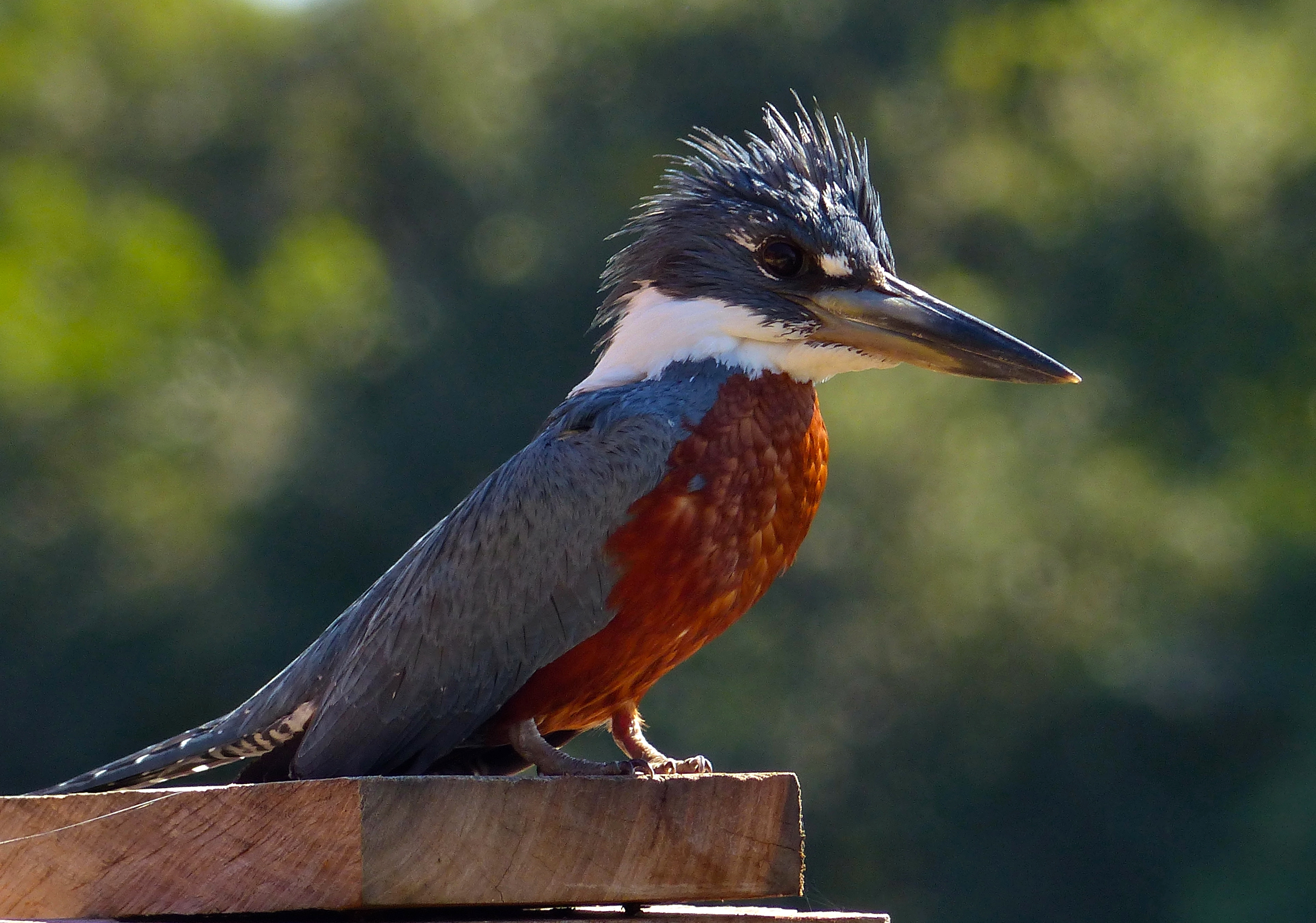 Hotel Pantanal Norte, Pixaim, Transpantaneira, Poconé, Mato Grosso, BRAZIL